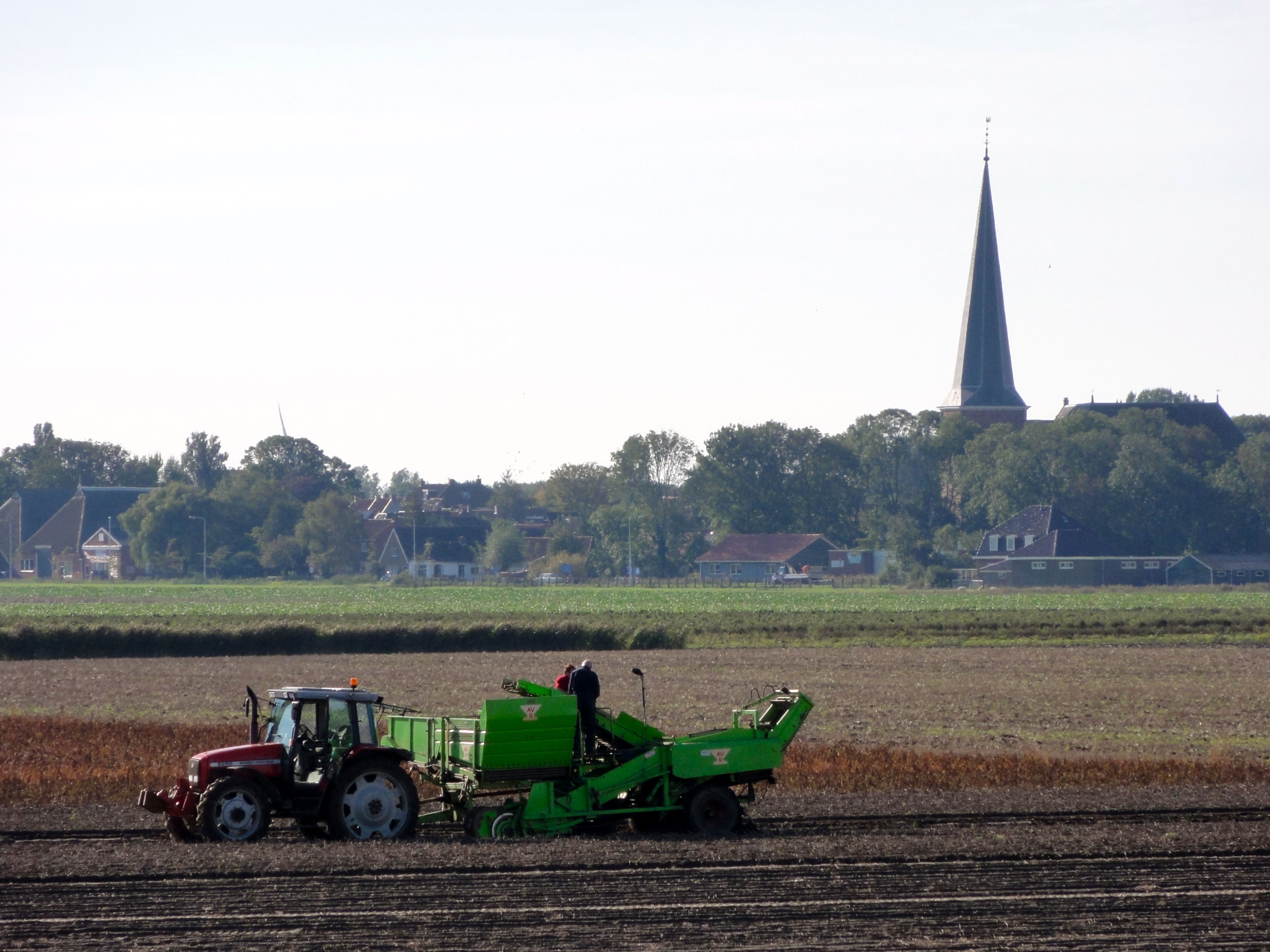 Zicht op Holwerd met de toren van de Sint-Willibrorduskerk, rijksmonument